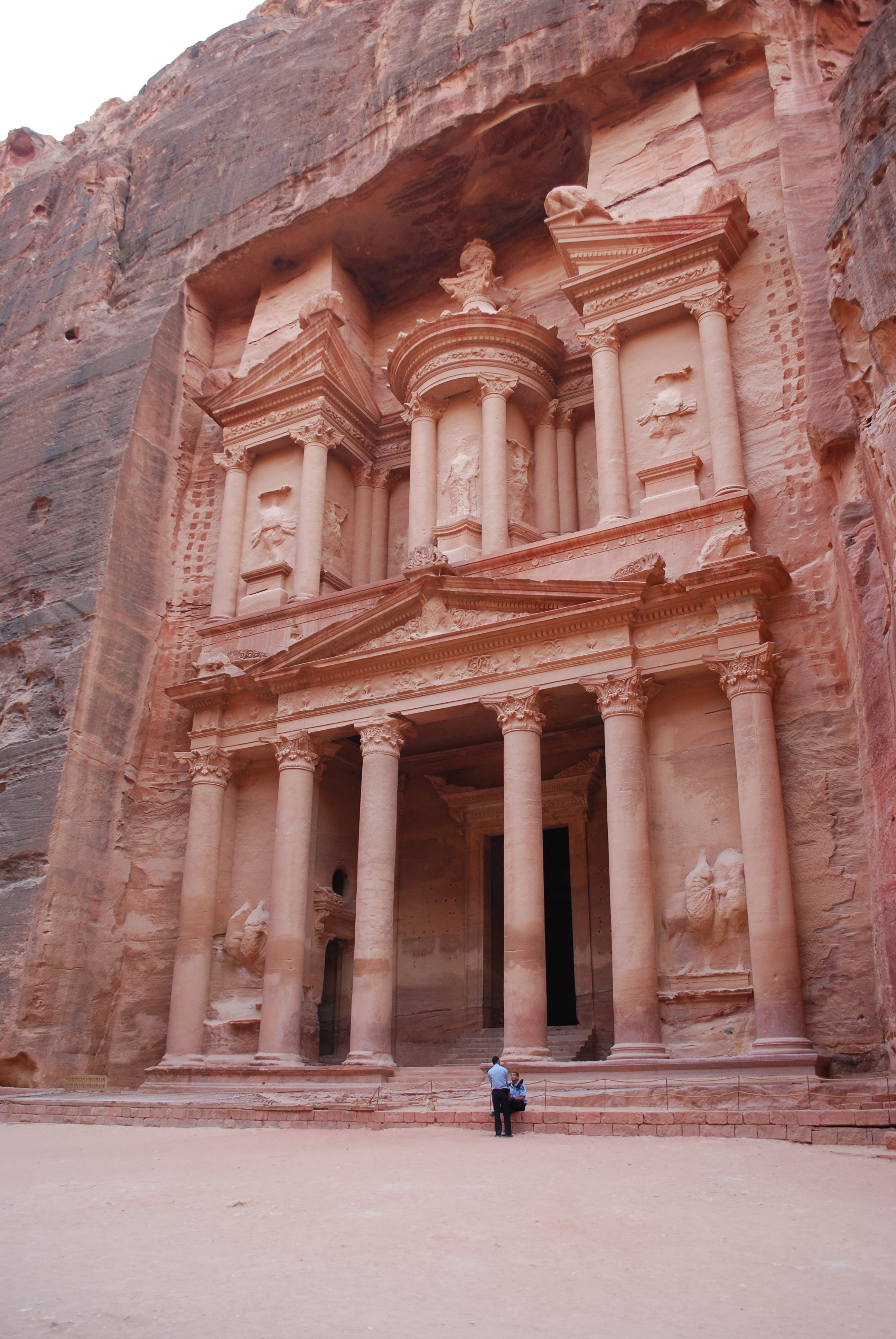 Al Khazneh.